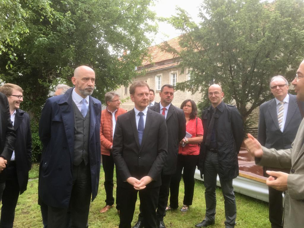 Ministerpräsident Michael Kretschmer besucht am 28. Mai 2019 die Schwesternhäuser in Kleinwelka. Thema waren unter anderem finanzielle Mittel zur Rettung der Bausubstanz.